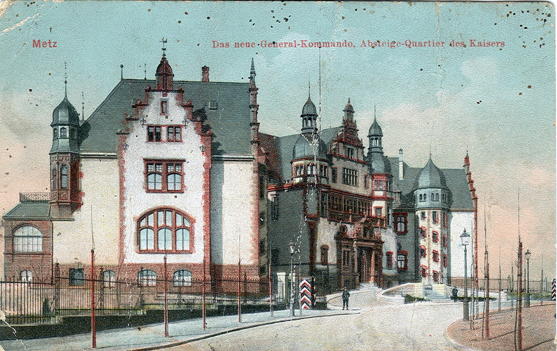 Postkarte, datiert vom 31.7.1917. Beschriftung: "Das neue Generalkommando. Absteige-Quartier des Kaisers"